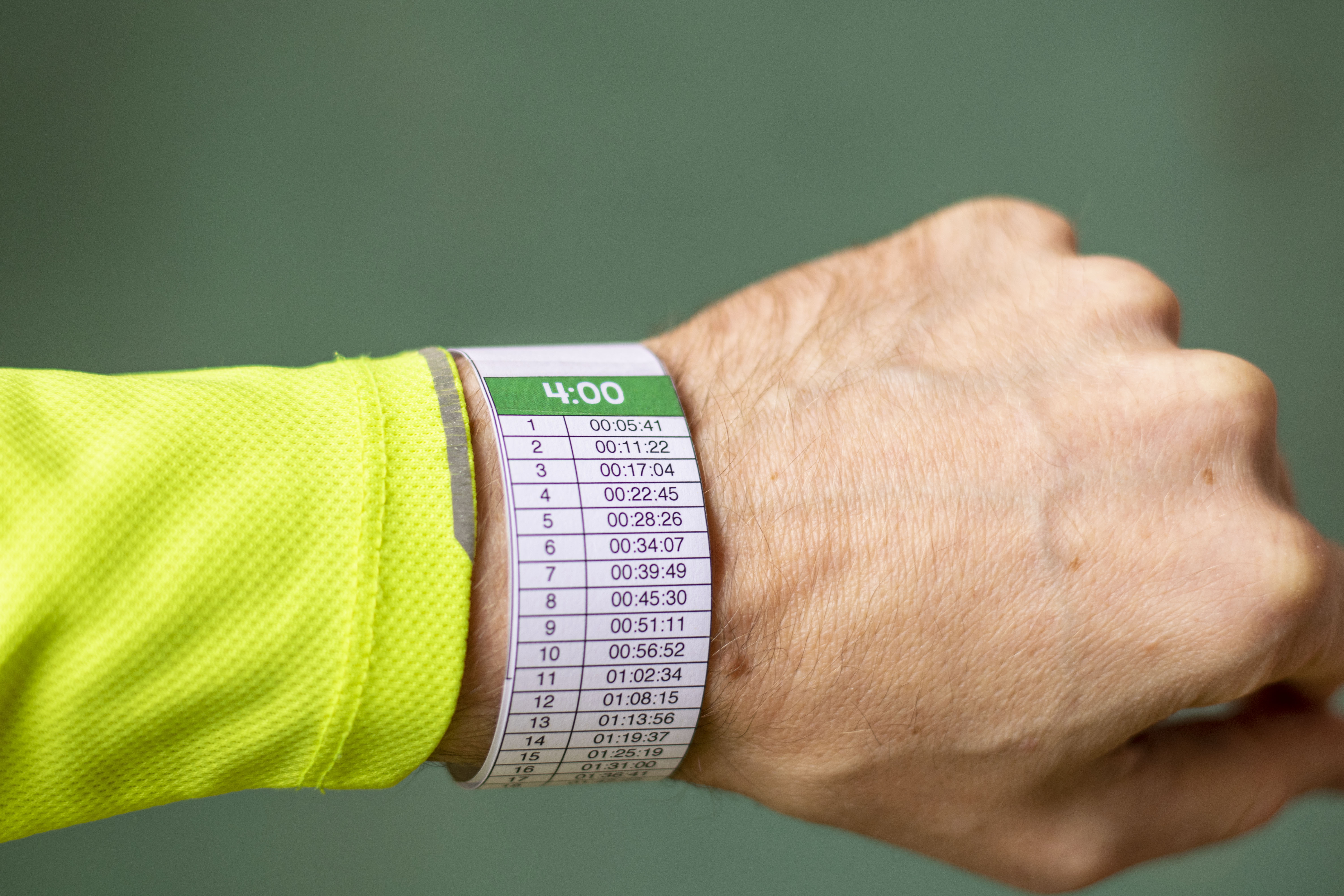 Tempotabelle für einen Marathon in 4 Stunden als Armband.